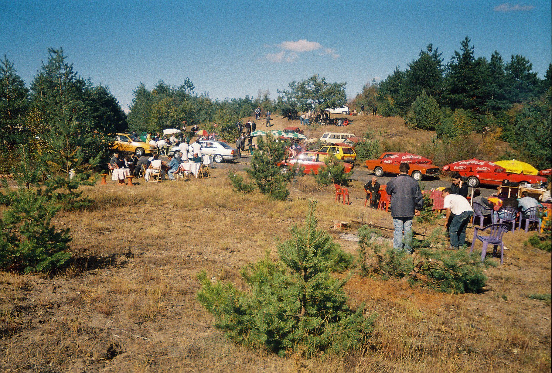 Ежегодния събор "Празник на планината"